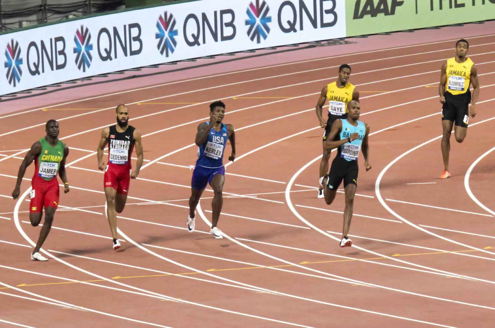 DOH80174 400m men final gardiner